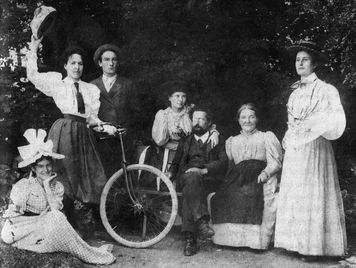 Von links nach rechts: Marie Winteler, Maja Einstein, Paul Winteler, Anna Winteler, Jost Winteler, Pauline Winteler, Rosa Winteler; um 1900.